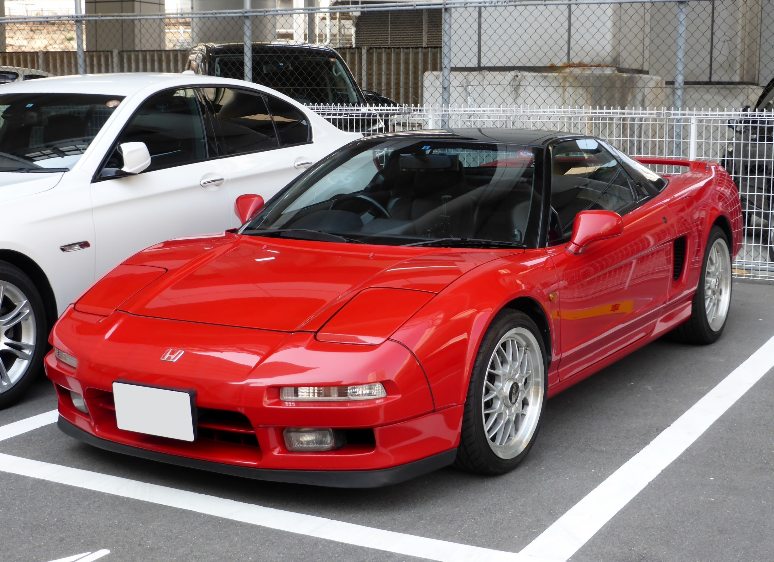 NA1型ホンダ・NSX 3.0タイプSをフロントから撮影。